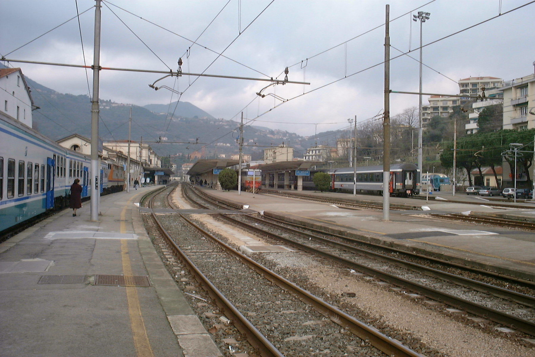 La Spezia station